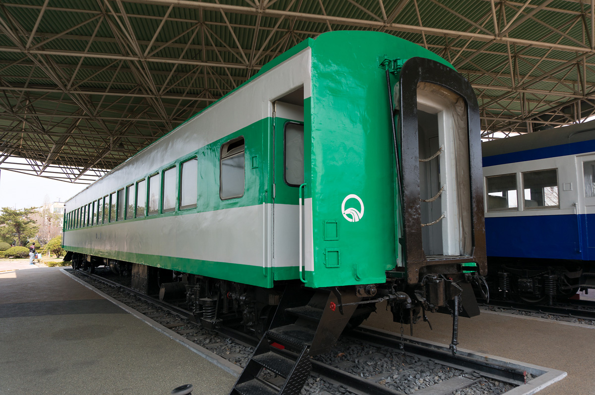 철도박물관에 전시중인 통일호 객차 외부